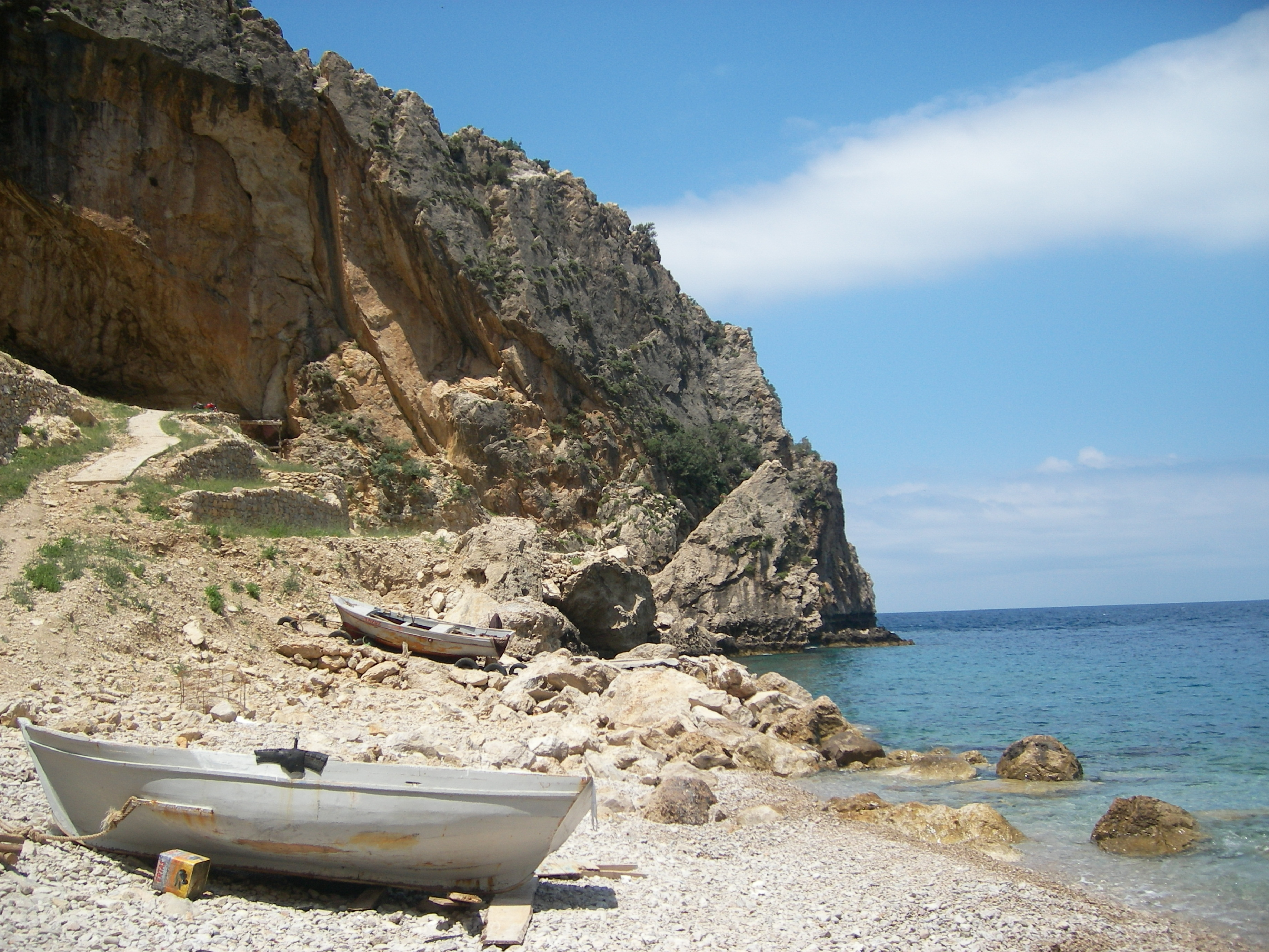 Yayladağı'nın Akdeniz kıyısında Kara Mağara bölgesi